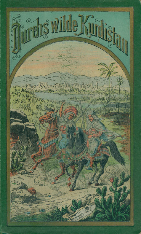 Buchdeckel der klassischen Ausgabe (ab 1892) der Erzählung Durchs wilde Kurdistan von Karl May.